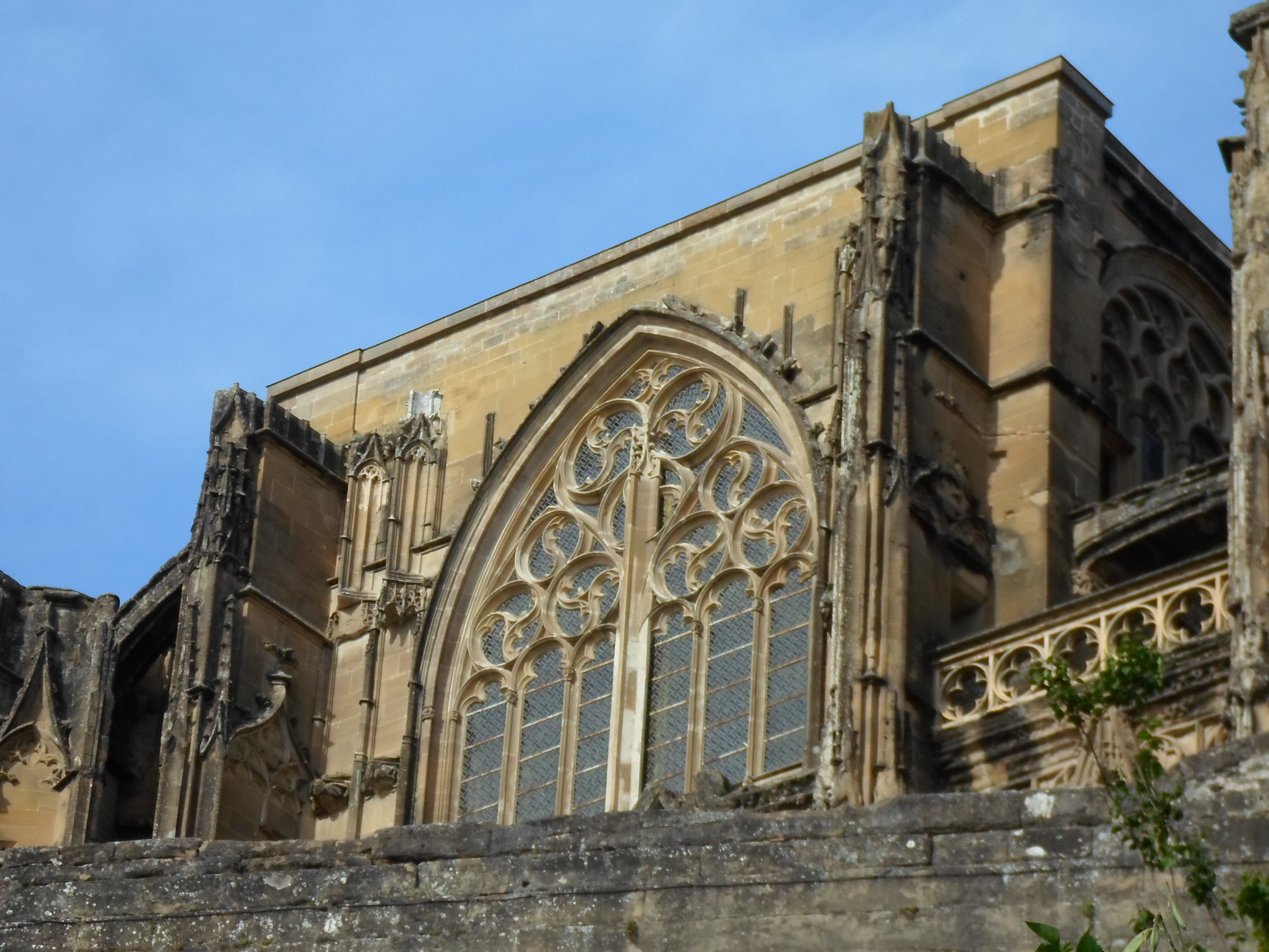 Eglise de Saint Antoine l Abbaye en ISERE (38) - FRANCE Coordonnées 45° 10′ 33″ nord, 5° 13′ 02″ est